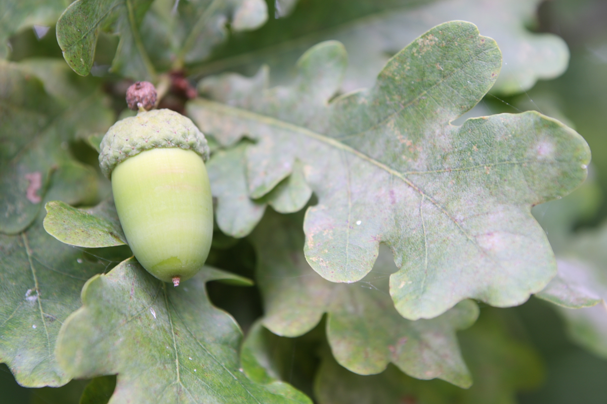 Tammetõru